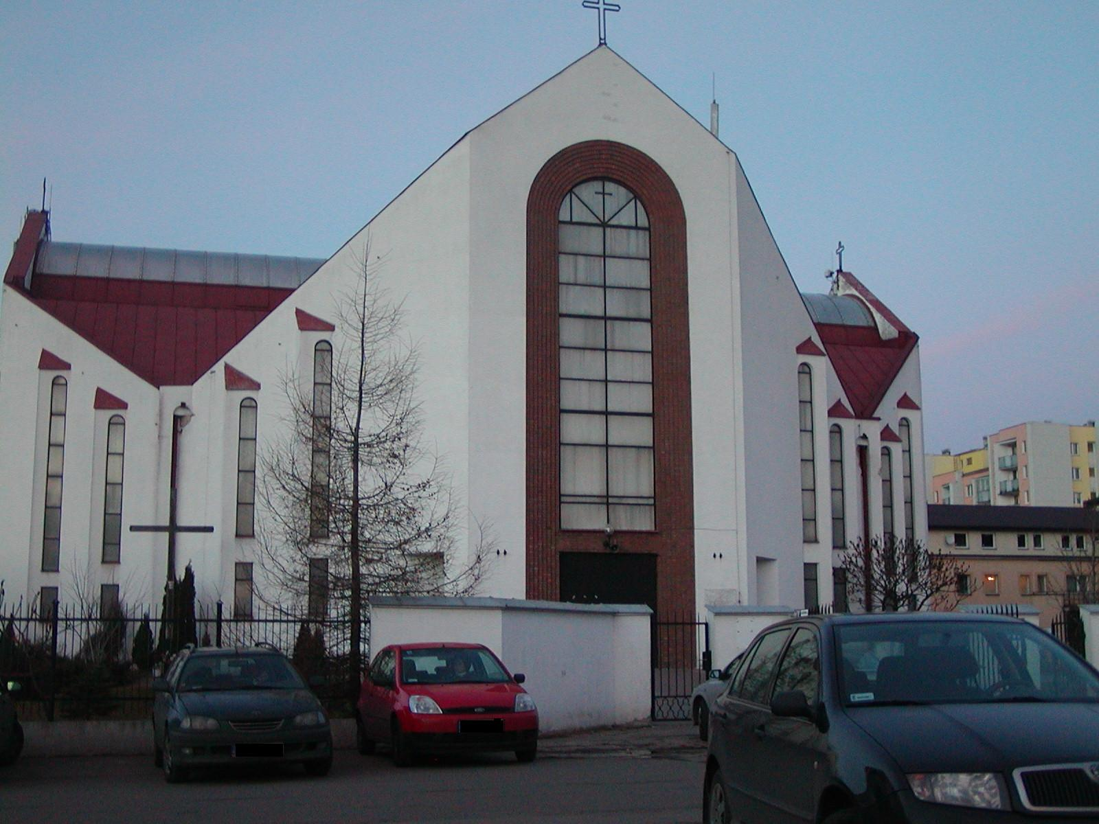 Parafia Rzymskokatolicka pw. Bogurodzicy Maryi na warszawskich Jelonkach